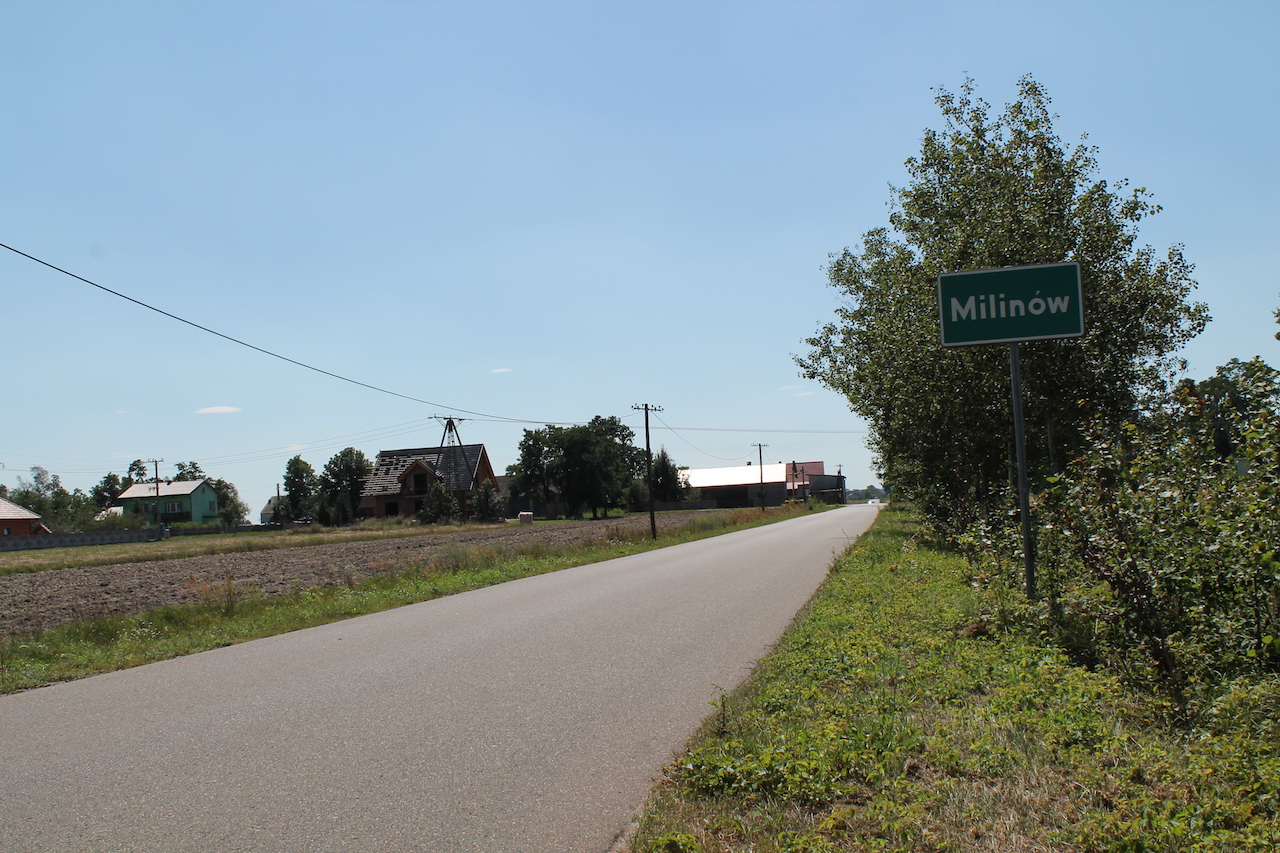 Wjazd do Milinowa od strony północnej (Natalii)